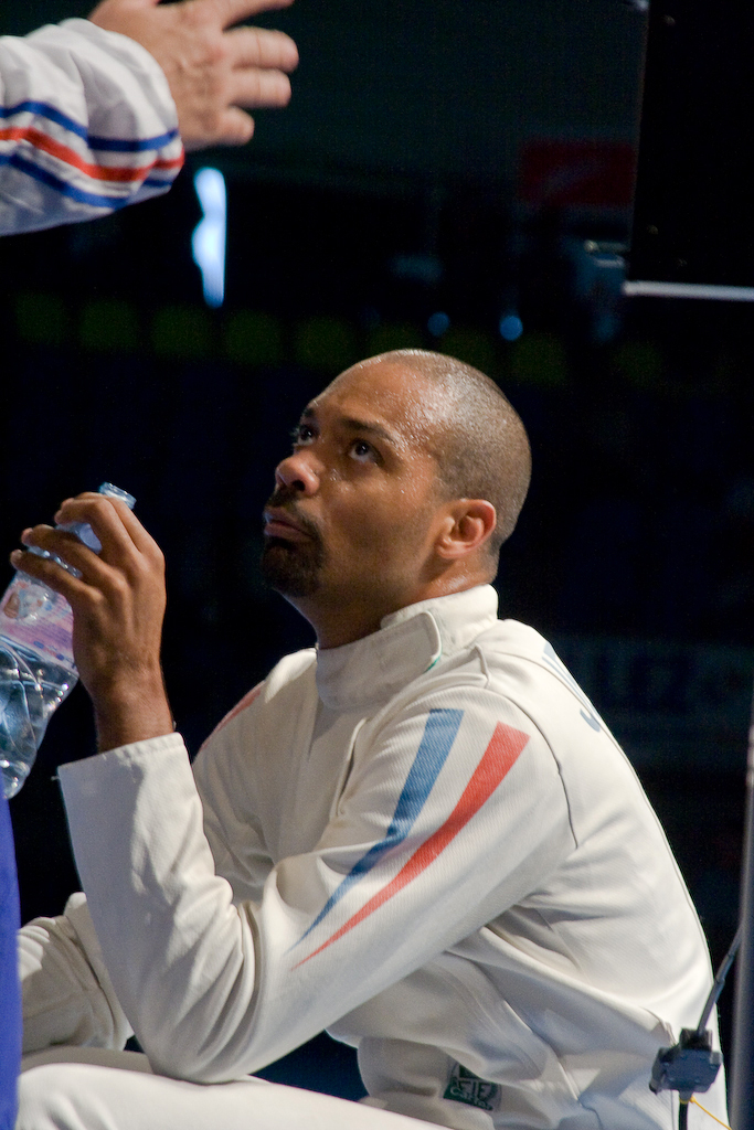 Prise le 4 juillet 2007 aux Championnats d'Europe d'escrime, à Gand (Flandre-Orientale) en Belgique. Jérôme Jeannet